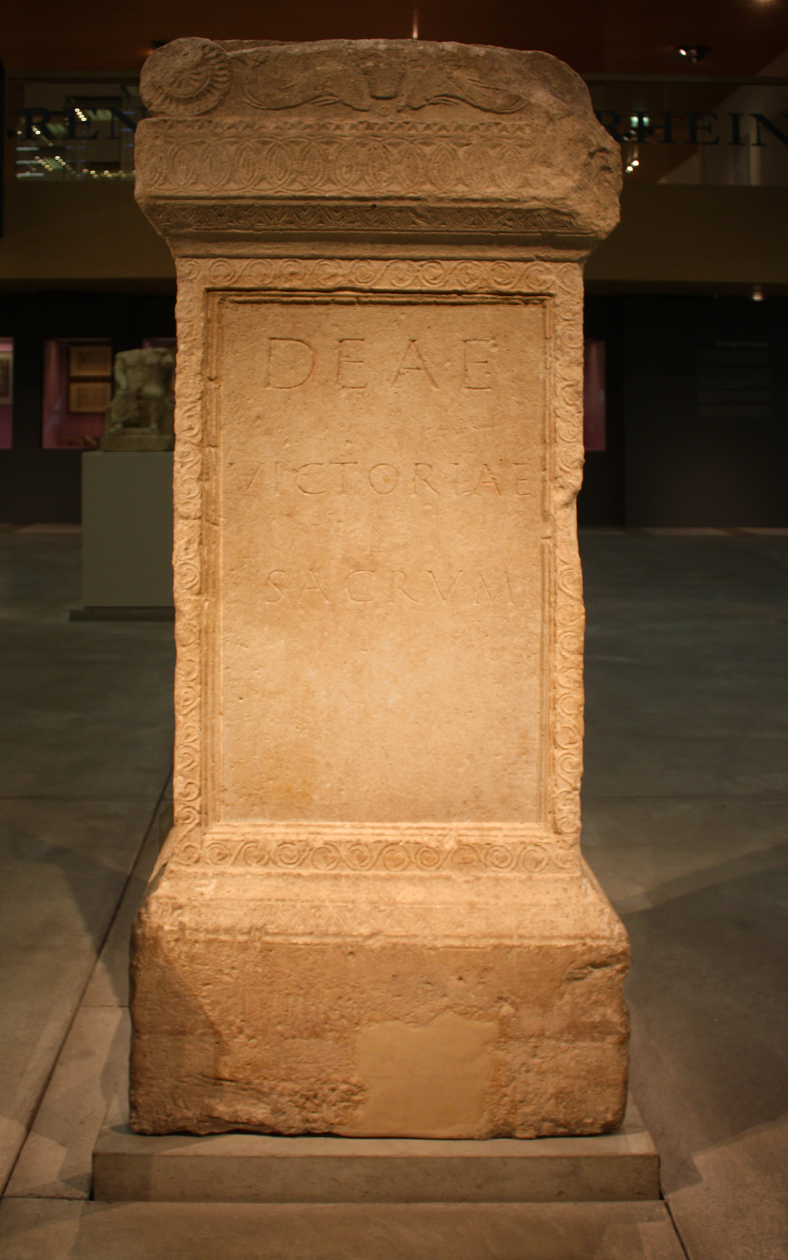 Altarstein „DEAE VICTORIAE SACRUM“, aus der Nähe des Flottenlagers Alteburg (Köln-Marienburg). Weihegeschenk als Dank für die Erfüllung einer Bitte, der Stifter ist jedoch unbekannt. Der für die Siegesgöttin „Victoriae“ errichtete Stein entstammt der 1. Hälfte des 3. Jahrhunderts und wurde wahrscheinlich schon im Spätmittelalter Teil einer kölnischen Sammlung. Er ist an allen Seiten mit kerbschnittartigen Ornamenten verziert. Begleittext und Ort der Ausstellung: Rheinisches Landesmuseum Bonn. CIL XIII 8252